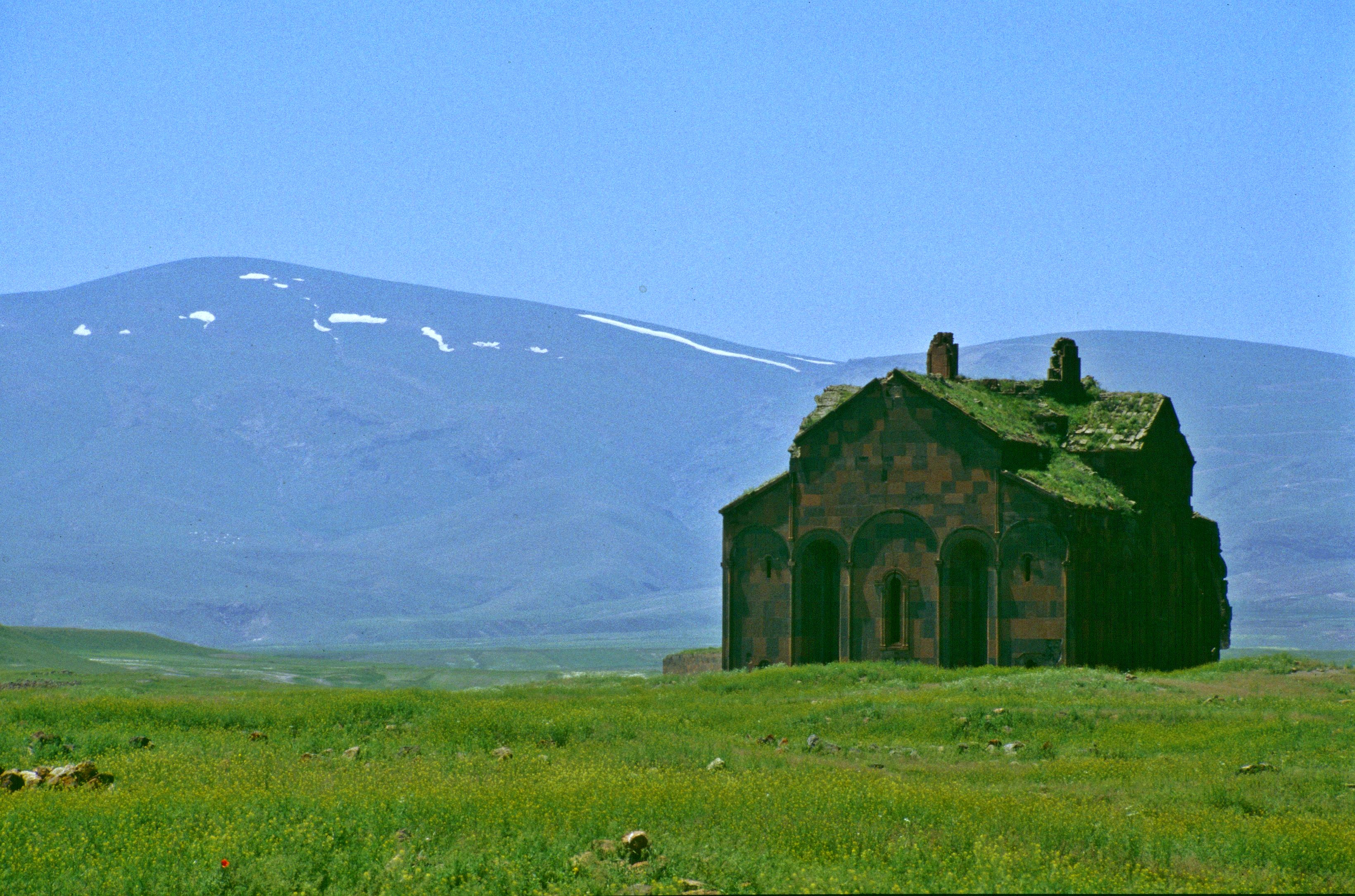 Kathedrale Ani